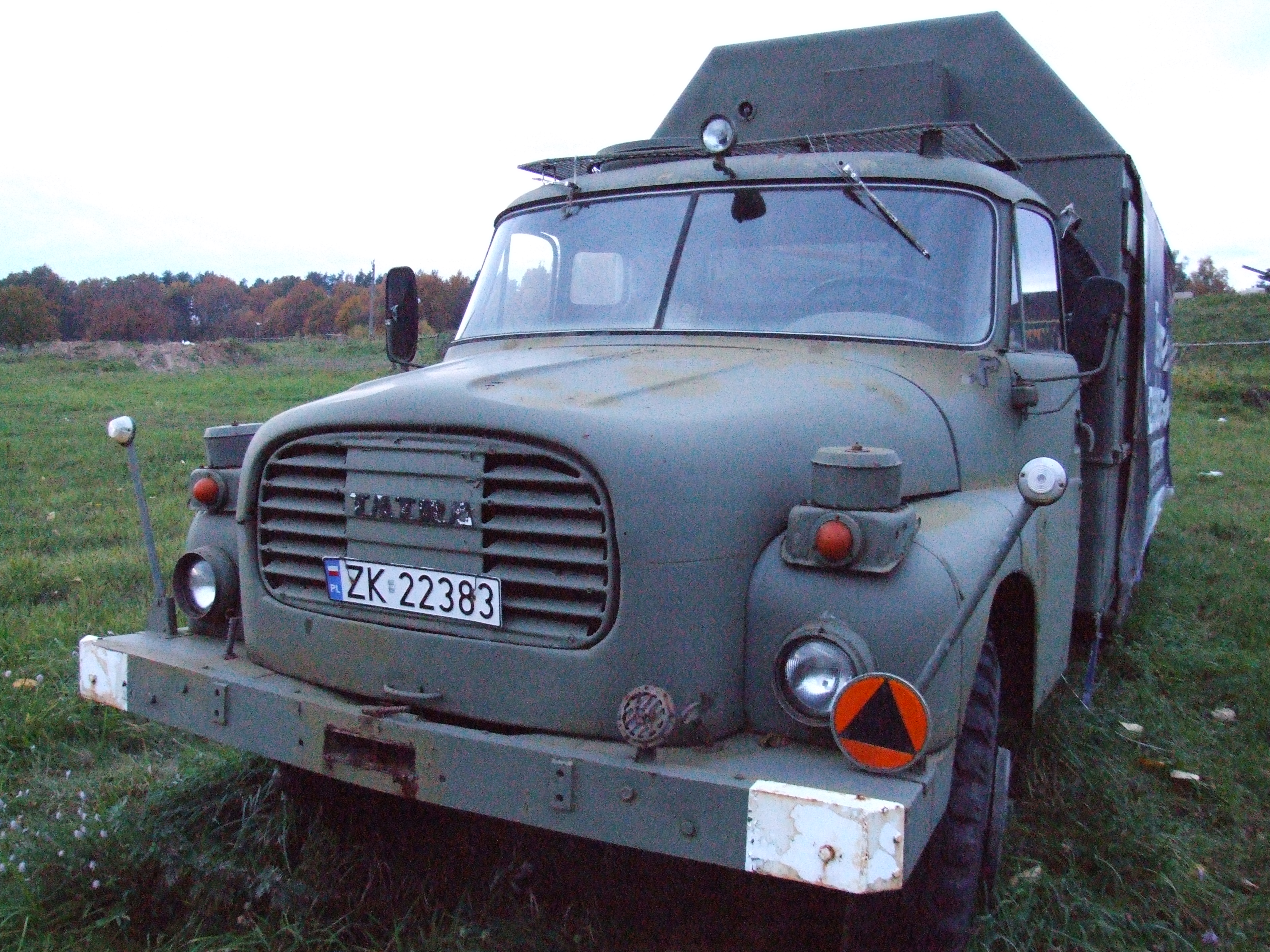 Tatra 148 z zabudową wojskową